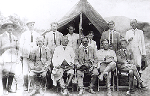 Comissão Construtora de Belo Horizonte (Acervo: Arquivo Público Mineiro)